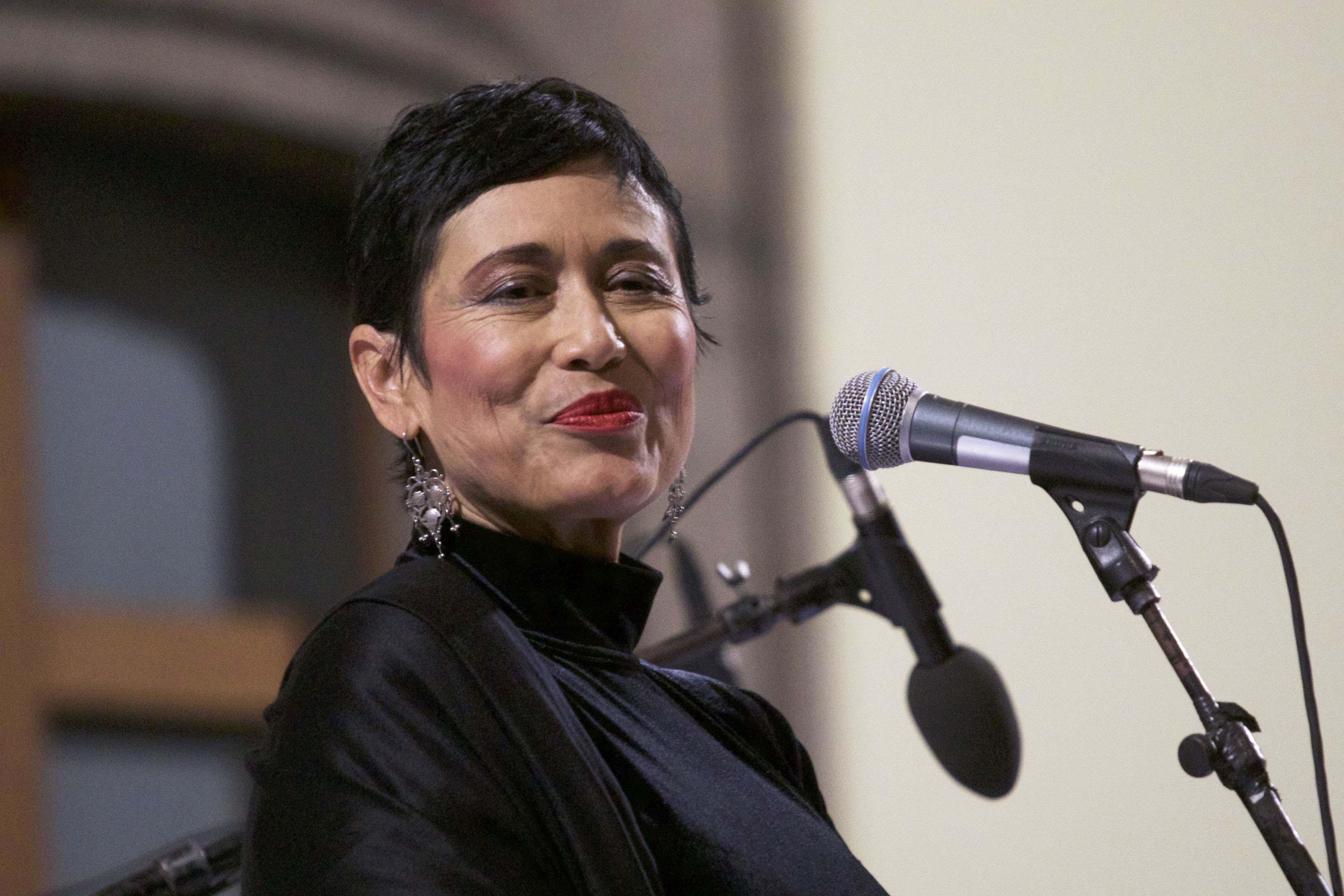 Martes 28 de noviembre de 2017 En Museo de la Ciudad de México la cantante Jaramar acompañada por el Cuarteto Latinoamericano, ofrecieron el concierto El hilo invisible, cantos sefaradíes, proyecto por el cual obtuvieron el Grammy Latino 2016. Fotografía; Milton Martínez / Secretaría de Cultura CDMX